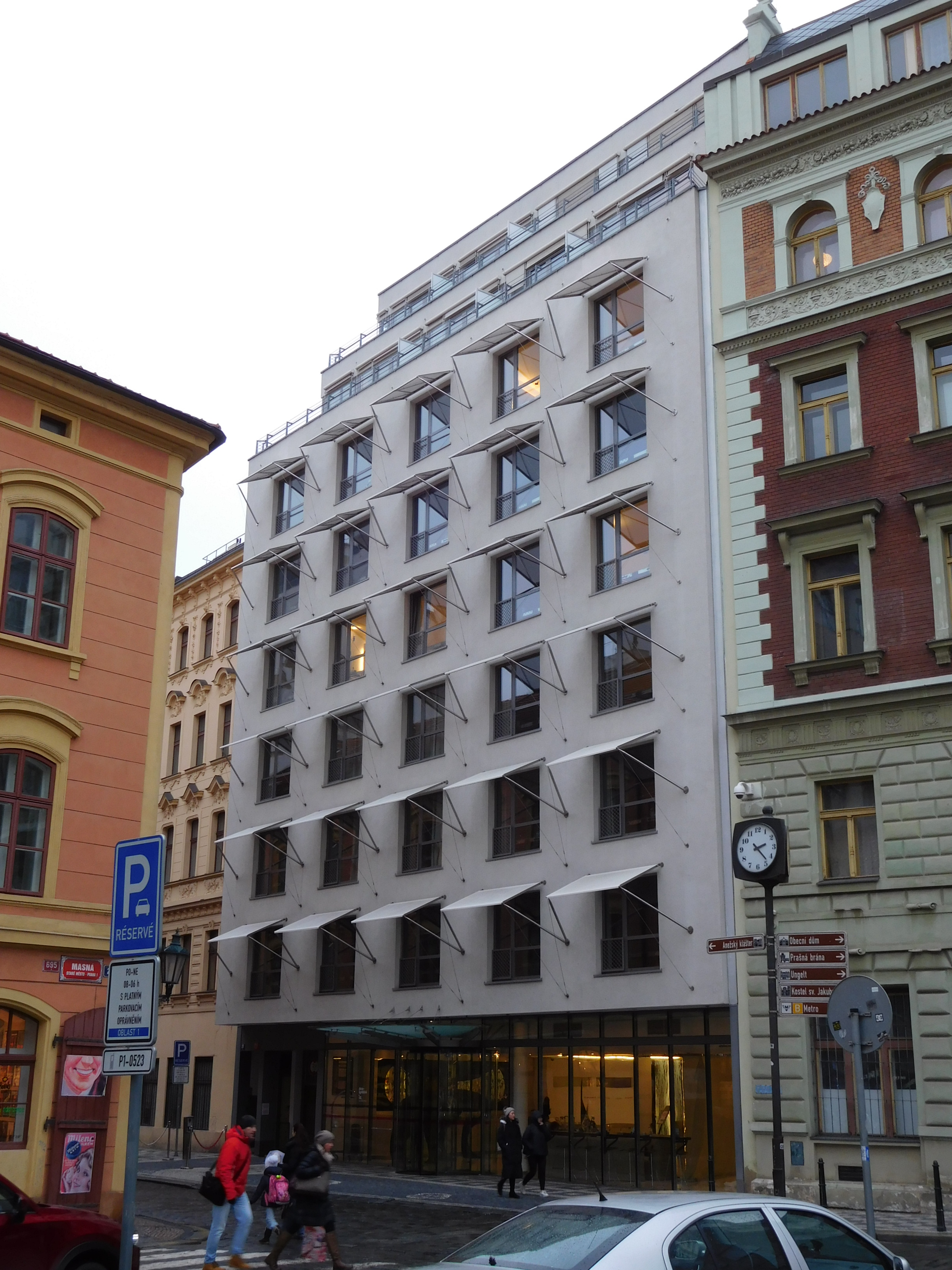 Praha - Staré Město, Rybná 20, Hotel Josef